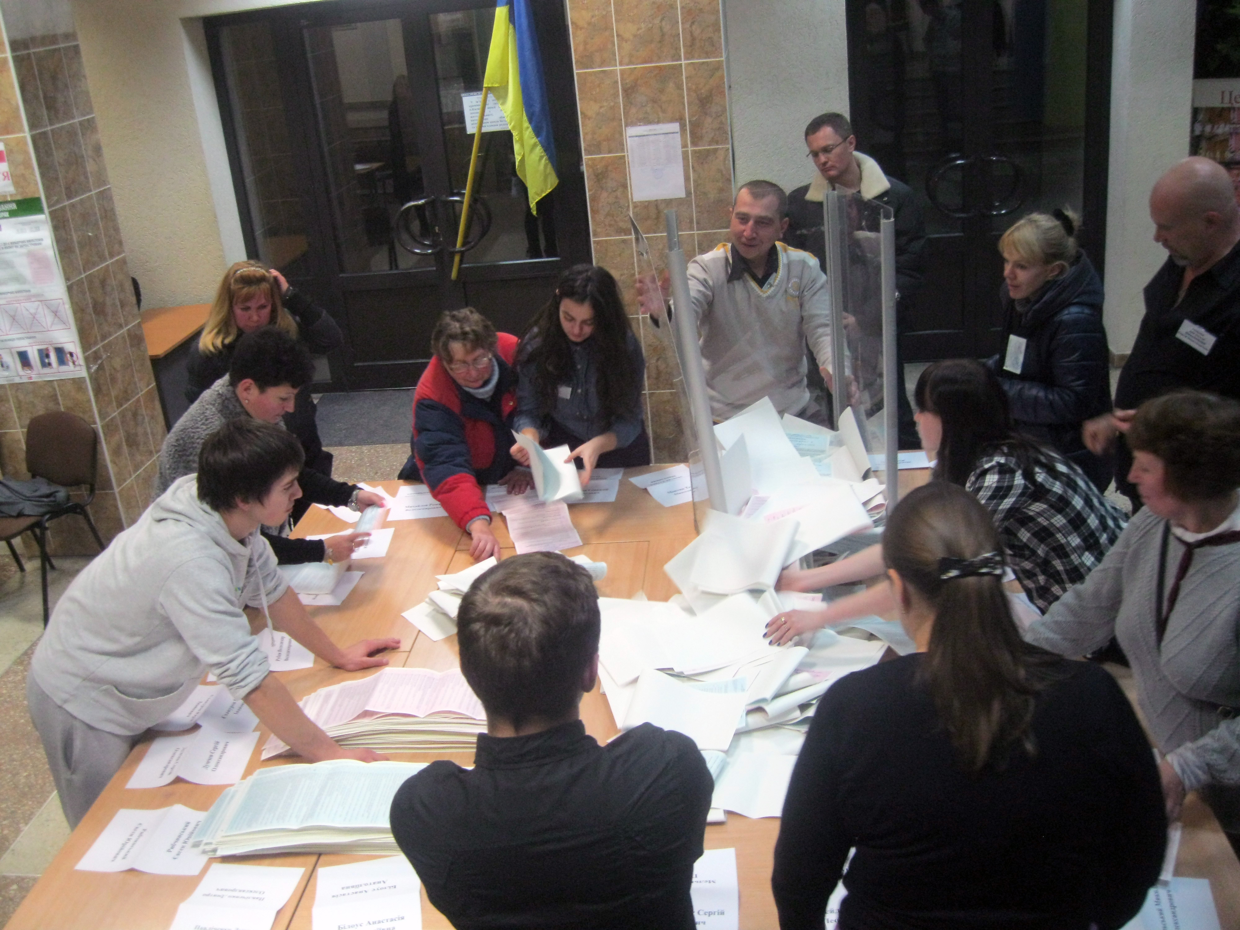 Відкриття однієї з останніх виборчих скриньок. Одна з ДВК у Солом'янському районі Києва.